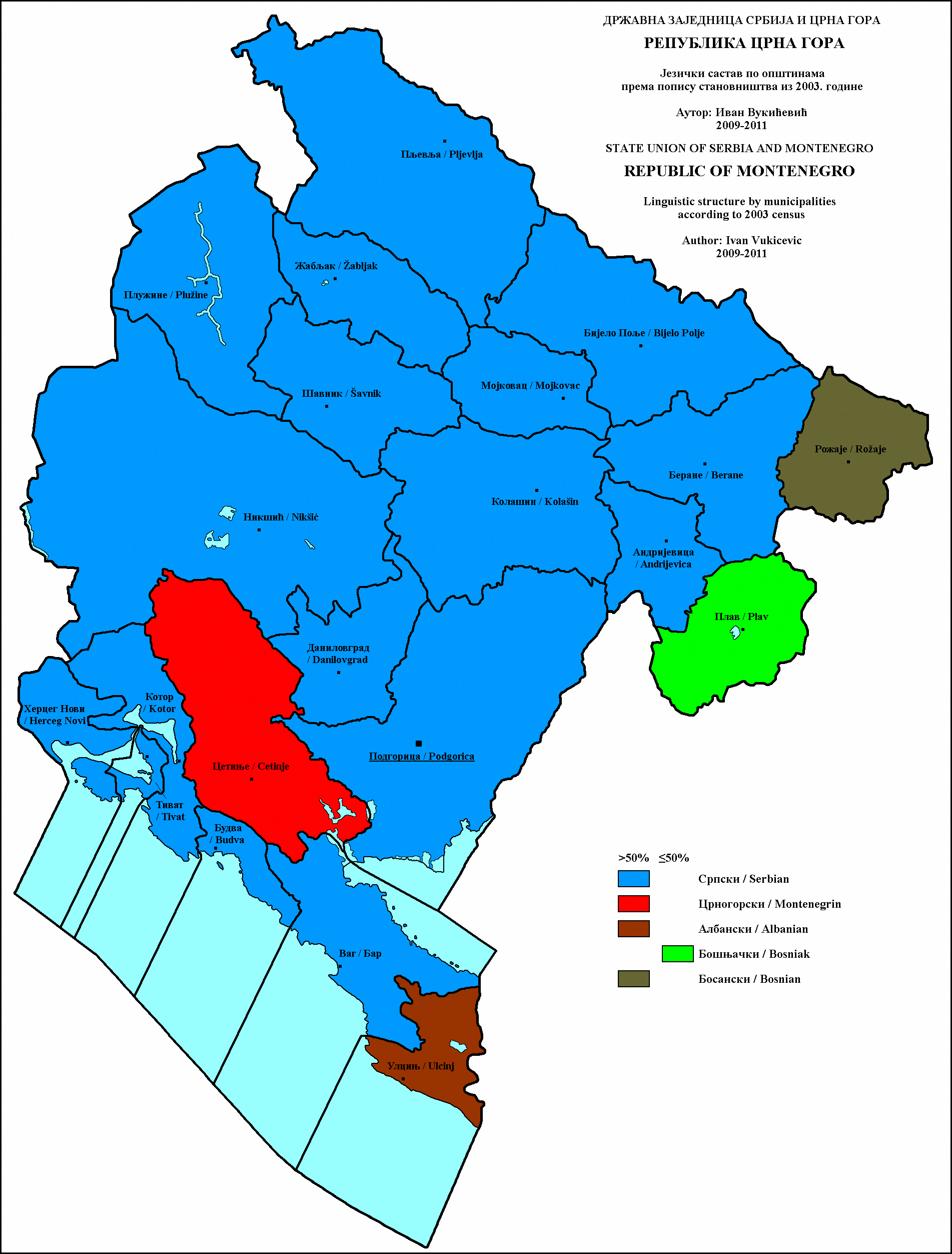 Језички састав Црне Горе по општинама 2003. године. Аутор: Иван Вукићевић